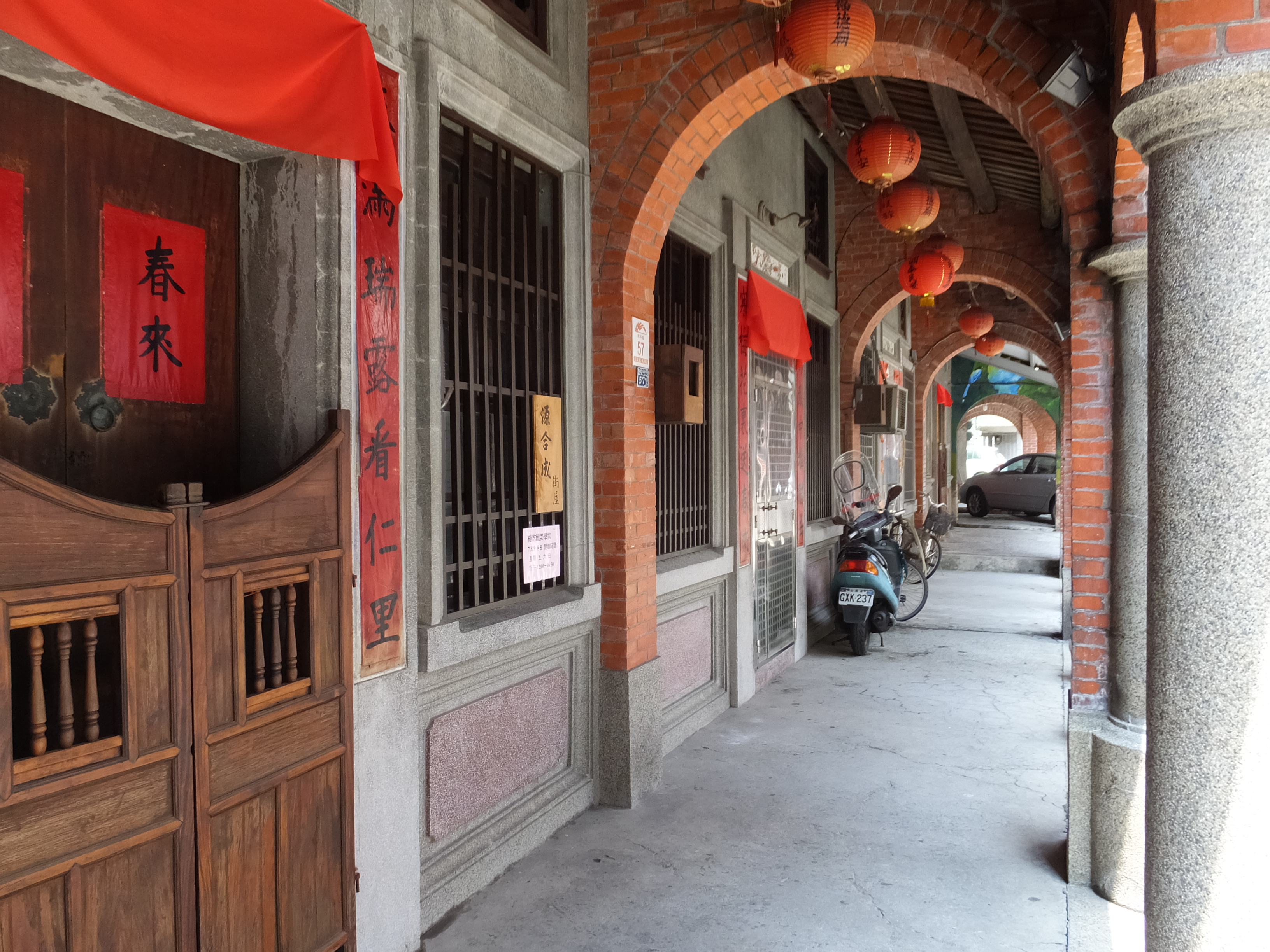 Toucheng Old Street 頭城老街